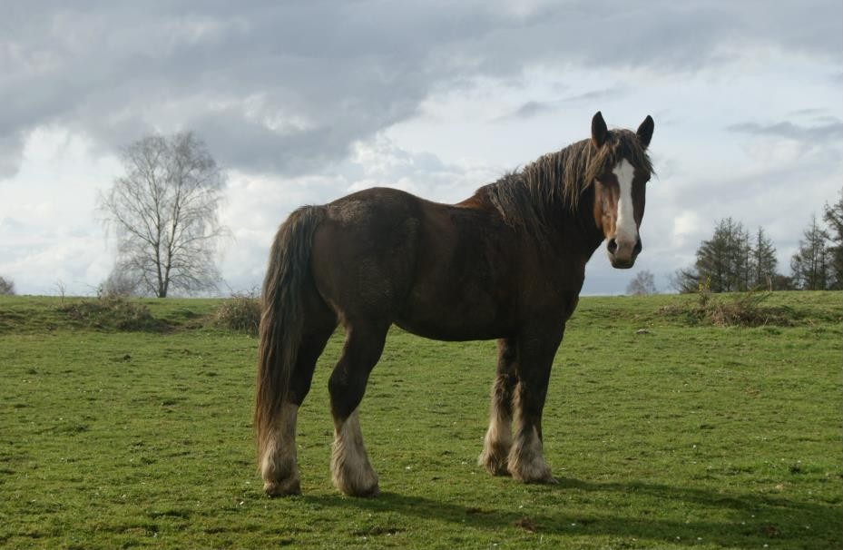 Urbanes de Kergadou, étalon postier breton agréé faisant la monte à l'élevage de Kerloc à St Fiacre (22)